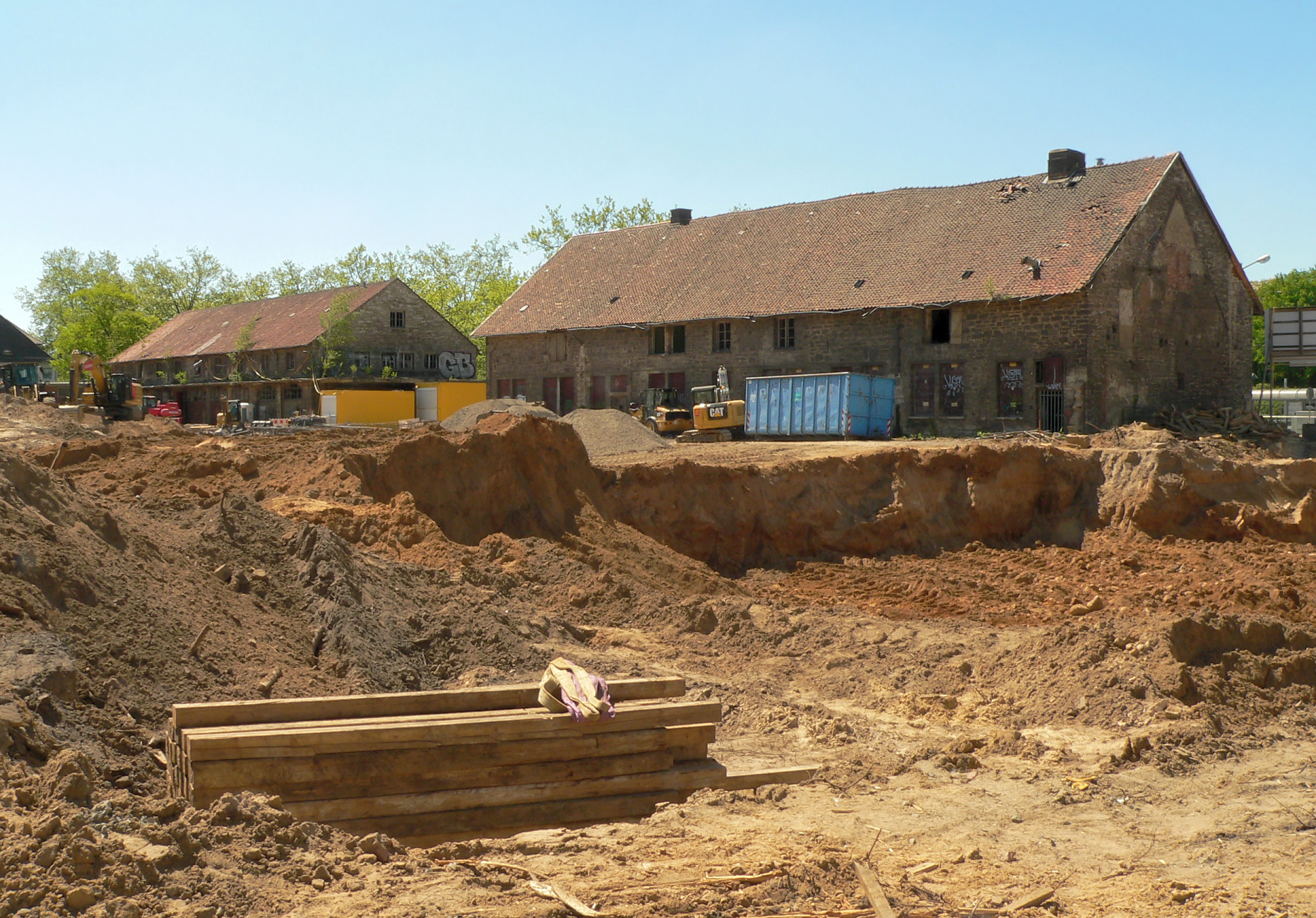 Stallbau von St. Leonhard Braunschweig am Leonardplatz, Umbau